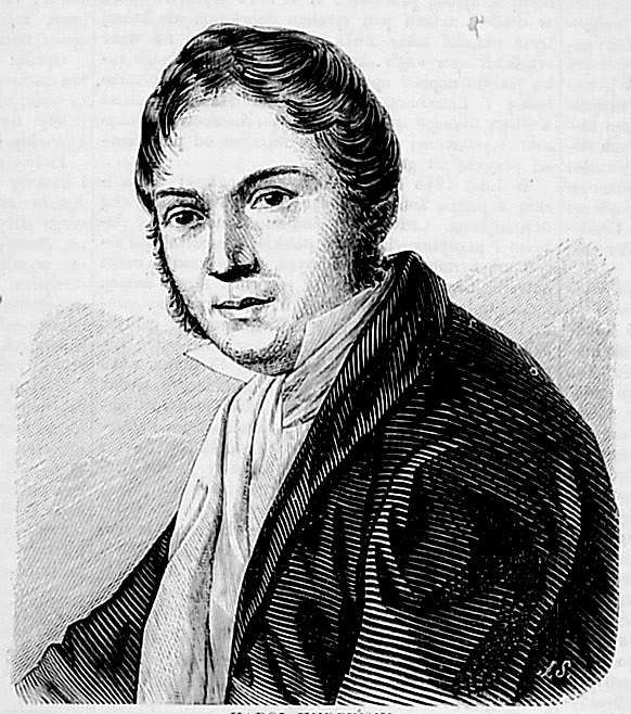 Karol Kurpiński 1785-1857